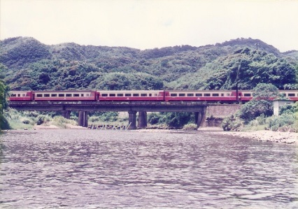 台鐵雙溪～貢寮間第二雙溪橋 was filmed by TDCKW on 19940709